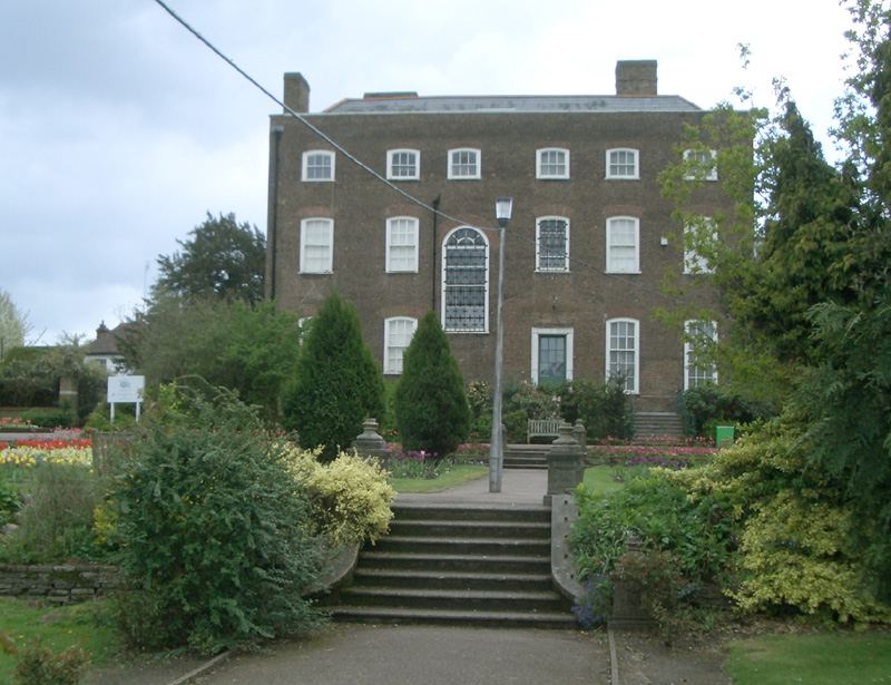 Geburtshaus William Morris im Walthams Forest, Parkseite